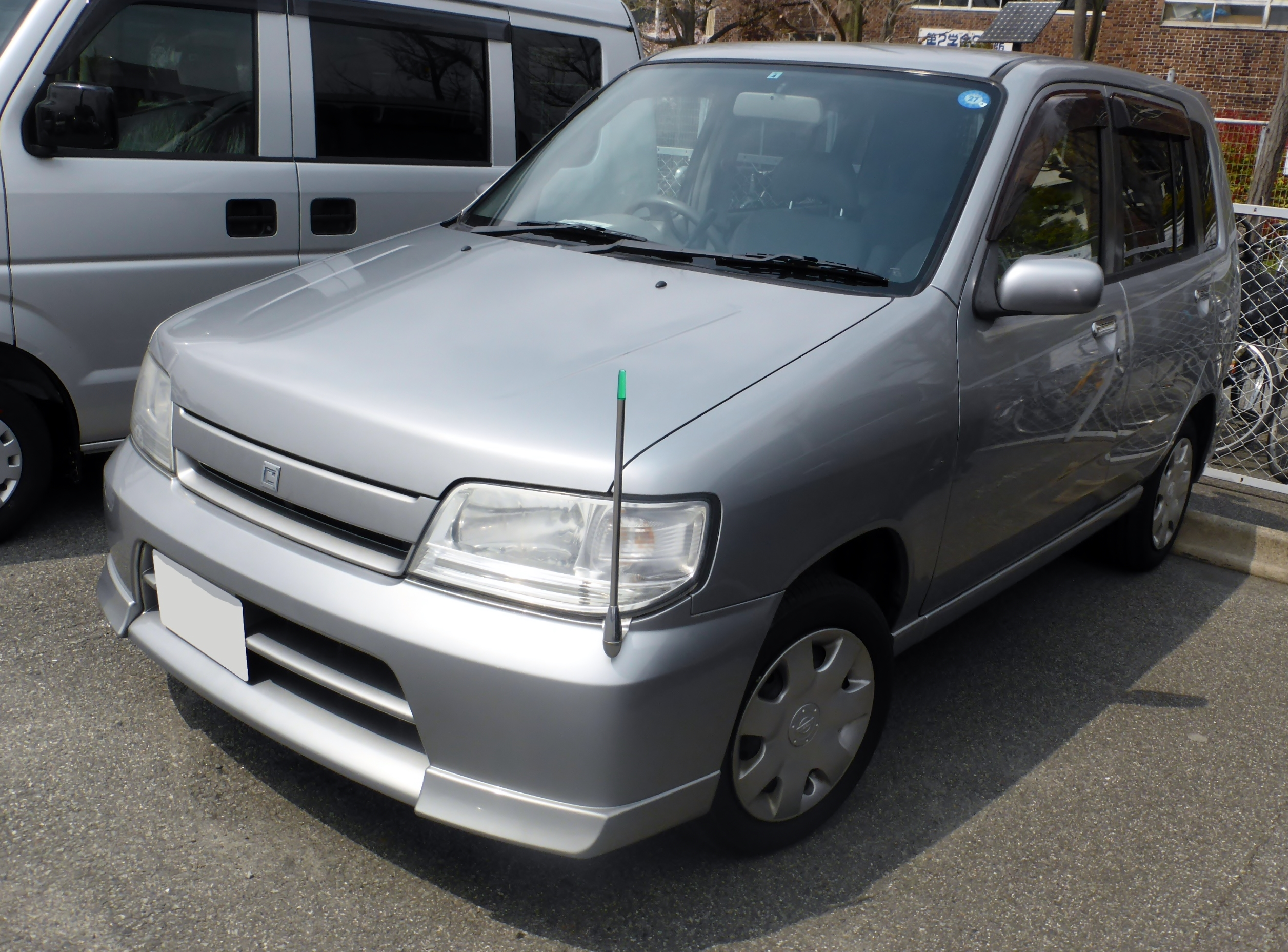 Z10型日産・キューブプレミアムをフロントから撮影。